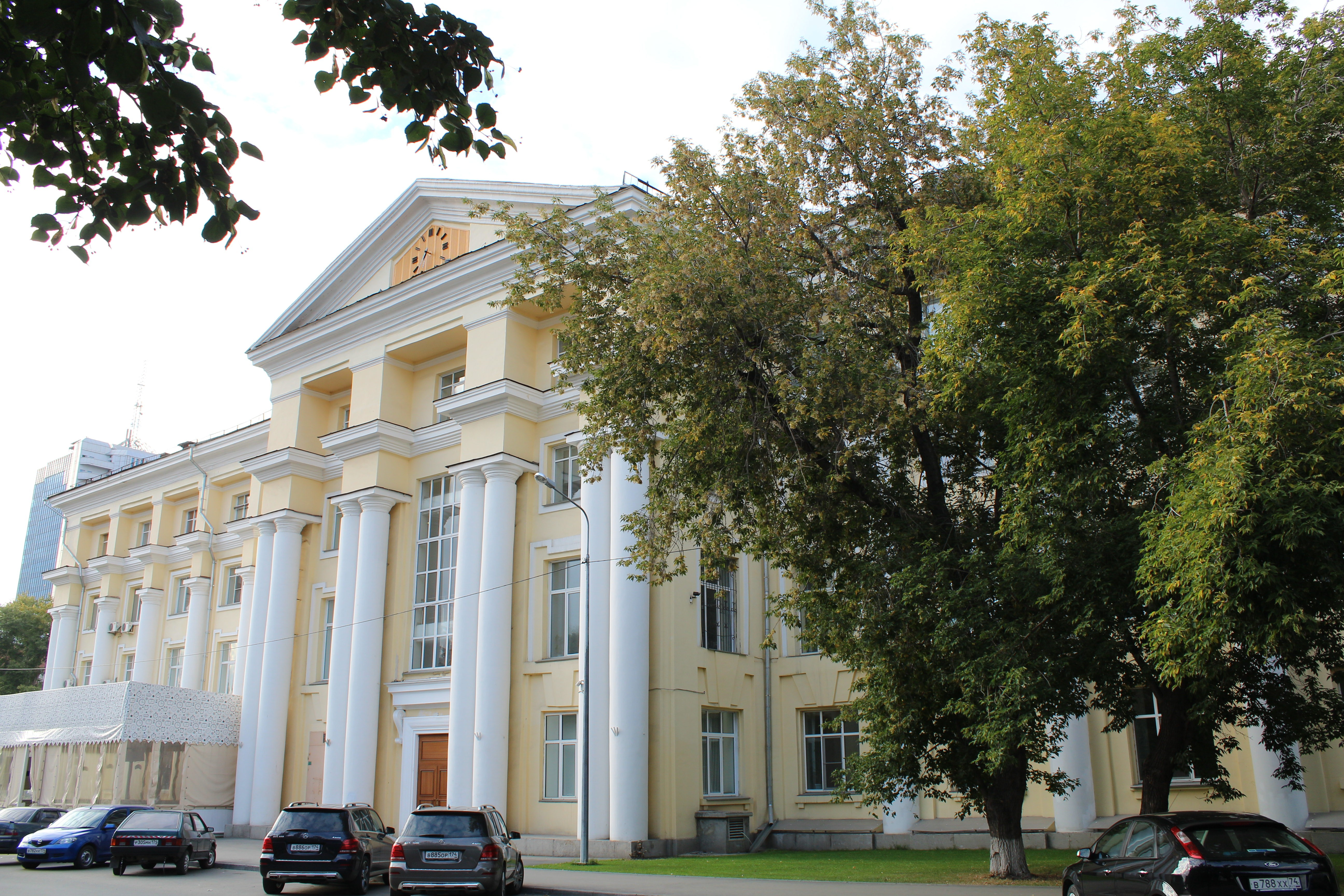 Часовая фабрика "Молния" (Челябинская область, Челябинск, Советская улица, 34)